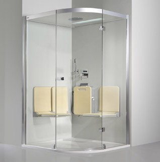 Artweger modern steam shower unit